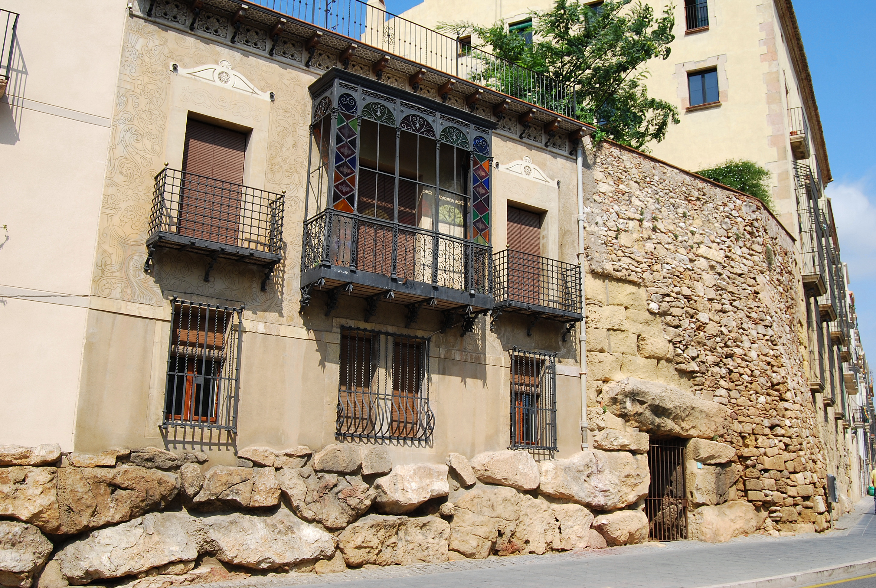 Muralles romanes de Tarragona, al passeig de Sant Antoni. Façana posterior de la casa Bartomeu Baró i, a baix a la dreta, la Portella dels Jueus